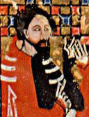 Portrait de Raymond Garaud, réalisé à l'occasion de son élection comme capitoul de Toulouse, en 1369.